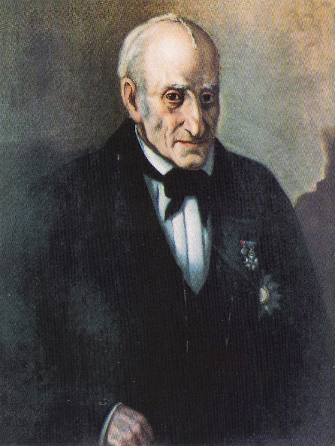 Quarto filho do Guarda-Mor Manuel José Monteiro de Barros e de sua mulher Margarida Eufrásia da Cunha Matos. Dedicou-se à mineração e à industria. Foi proprietário de rica lavra de ouro em Congonhas e ai fundou, em sociedade com dois irmãos, a primeira fábrica de ferro estabelecida na província. Membro do segundo governo provisório de Minas Gerais, eleito a 23 de maio de 1823; fez parte do Conselho do Governo, de 1825 a 1829 e de 1830 a 1833; vice-presidente da província, com exercício a 10 de junho de 1850. Coronel de Milícias, Cavaleiro da Imperial Ordem de Cristo e finalmente agraciado por decreto imperial de 2 de dezembro de 1854, com o titulo de Barão de Paraopeba.